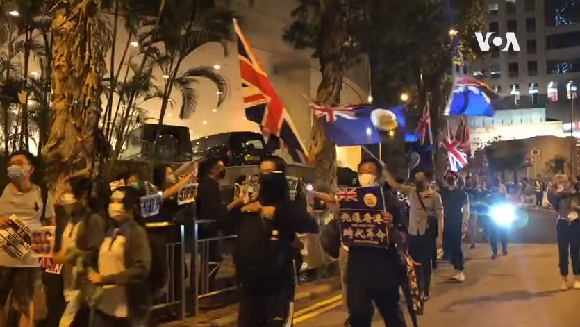 大批香港市民星期三（10月23日）晚高舉英國國旗及標語，在英國駐港總領事館門外遊行，呼籲英國關注香港反送中運動爭取民主及普選的訴求。